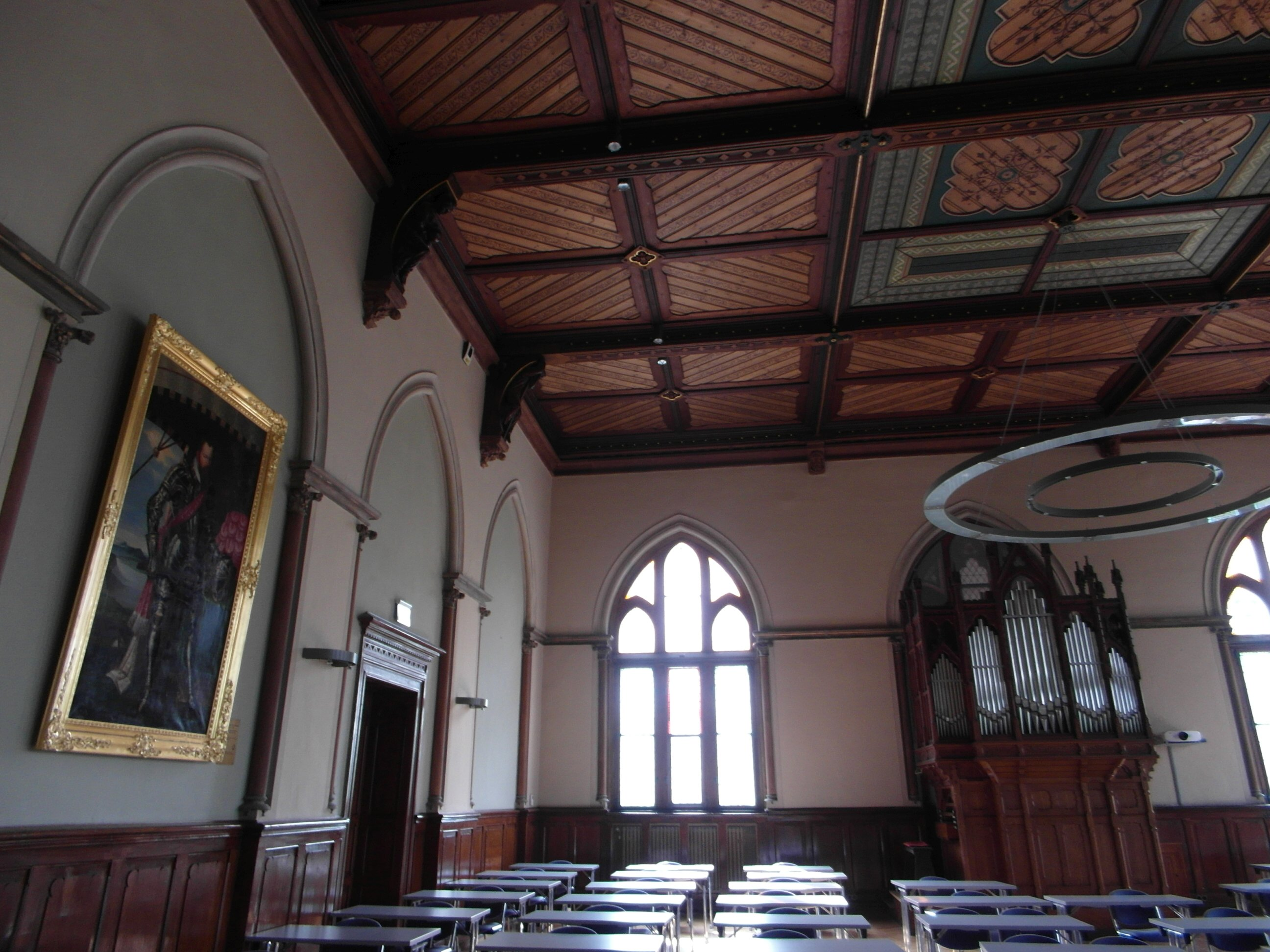 Aula der Landesschule Pforta